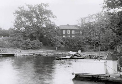 Kummelnäsviken Gårdens huvudbyggnad från sjösidan med delar av yttre hamnen kvar. 1960-talet